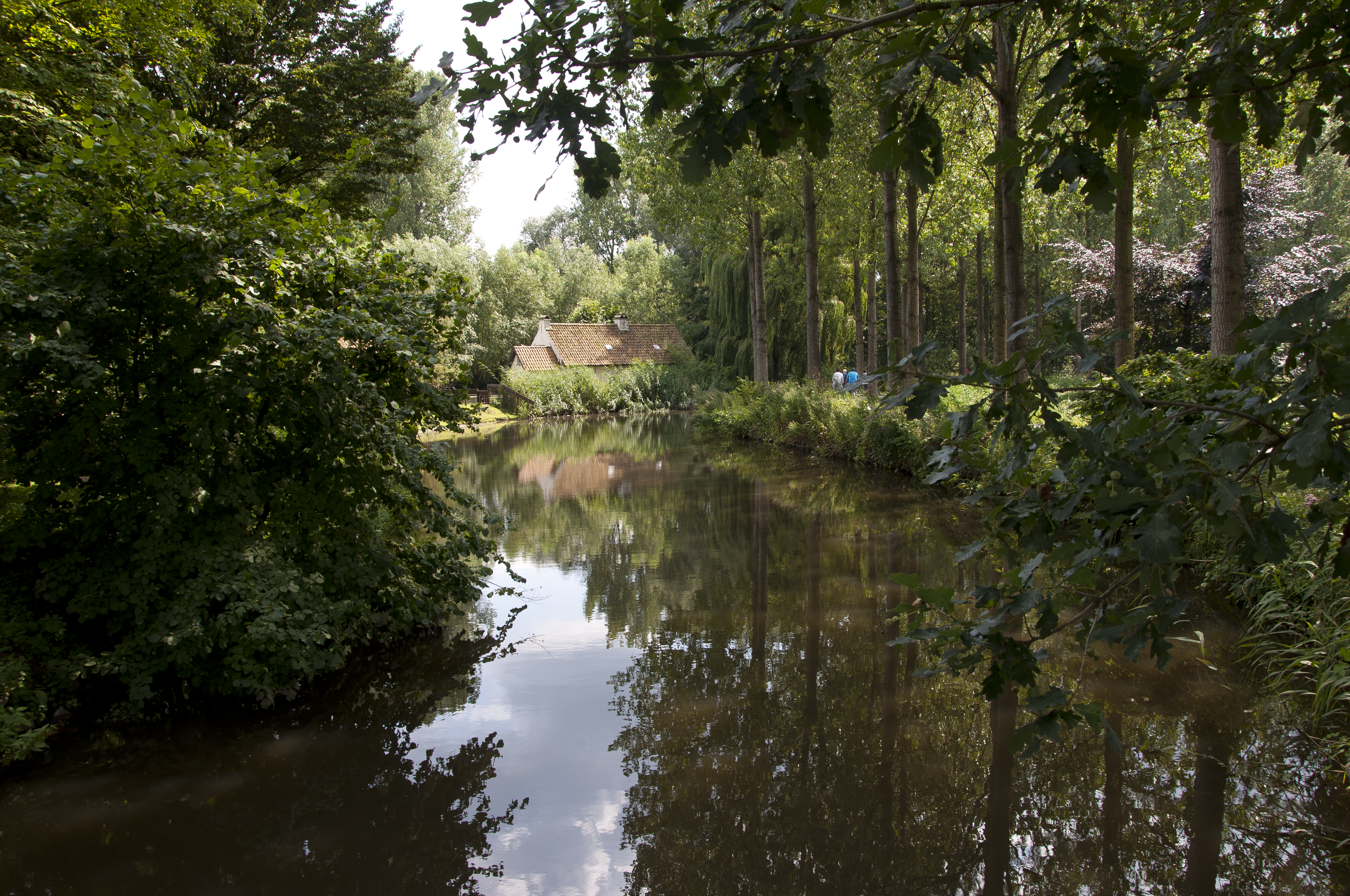 De Zuidlede te Puyenbroeck, Wachtebeke, België